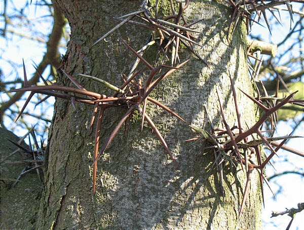 Stamm einer Gleditschie (gleditsia), Schleuse Liebenwalde, 2007